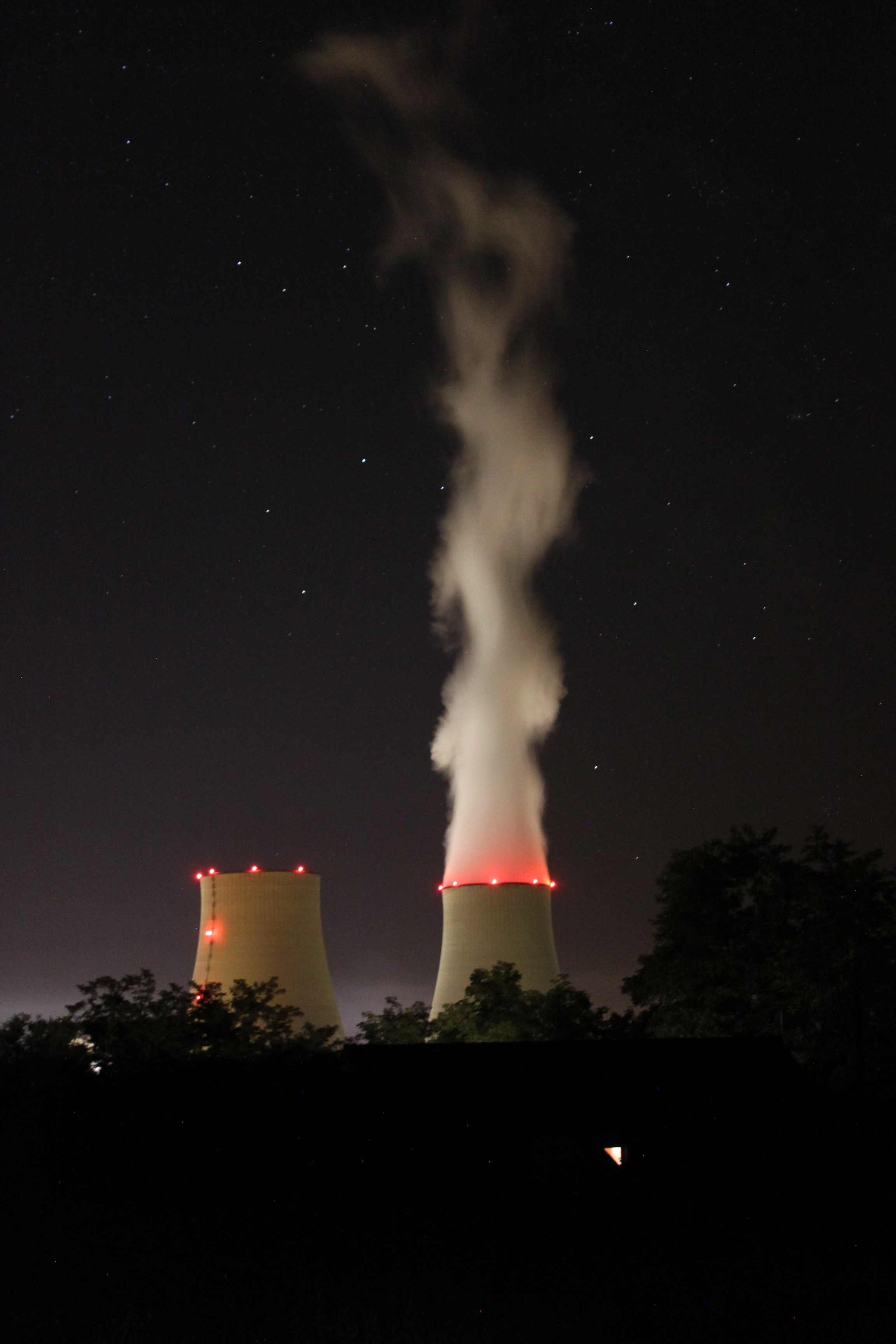 Centrale de Belleville-sur-Loire, France